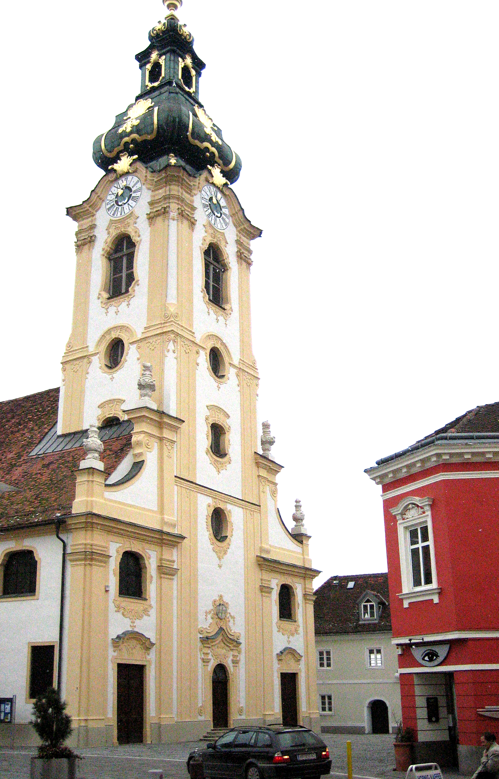 Hartberg Pfarrkirche, Barocke Hauptfassade (West)